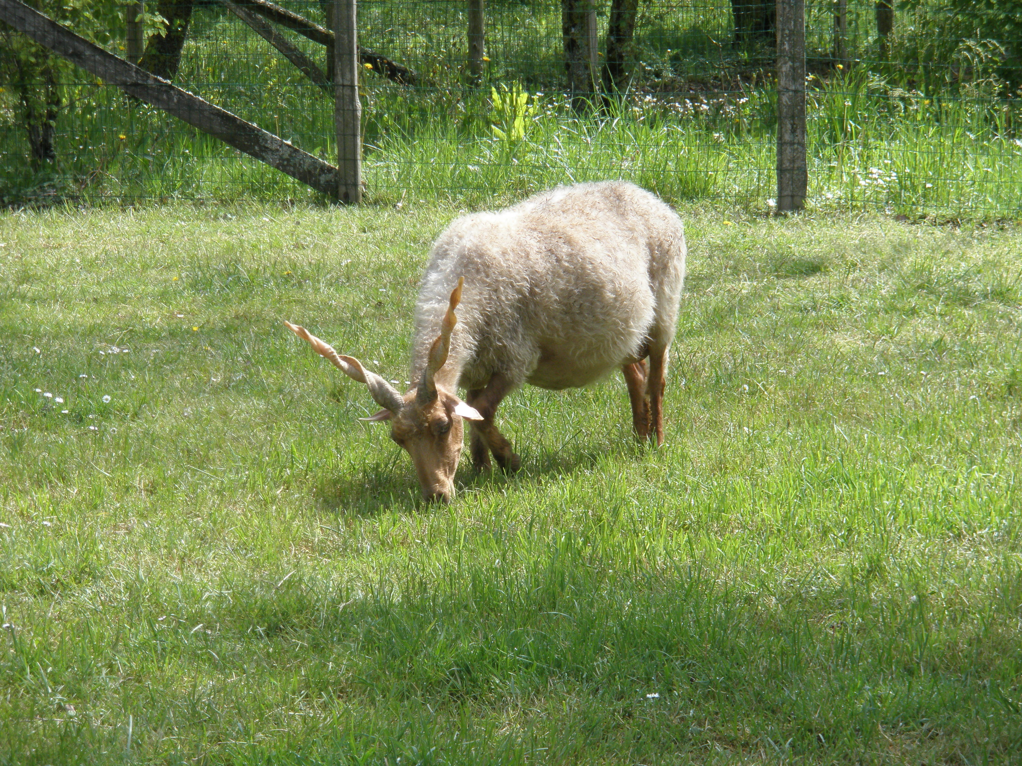 mouton Racka à Moutonvillage (Vasles 79) en mai 2012